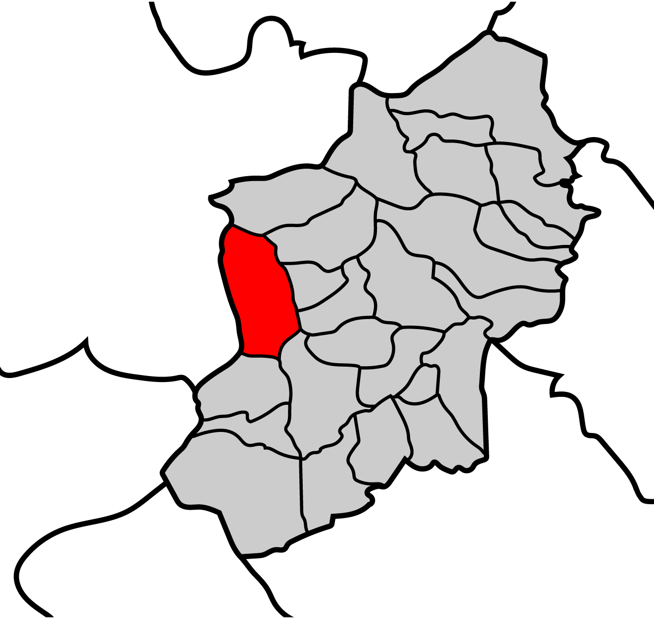 Mapa de la parroquia de Penamaior ayuntamiento de Becerreá